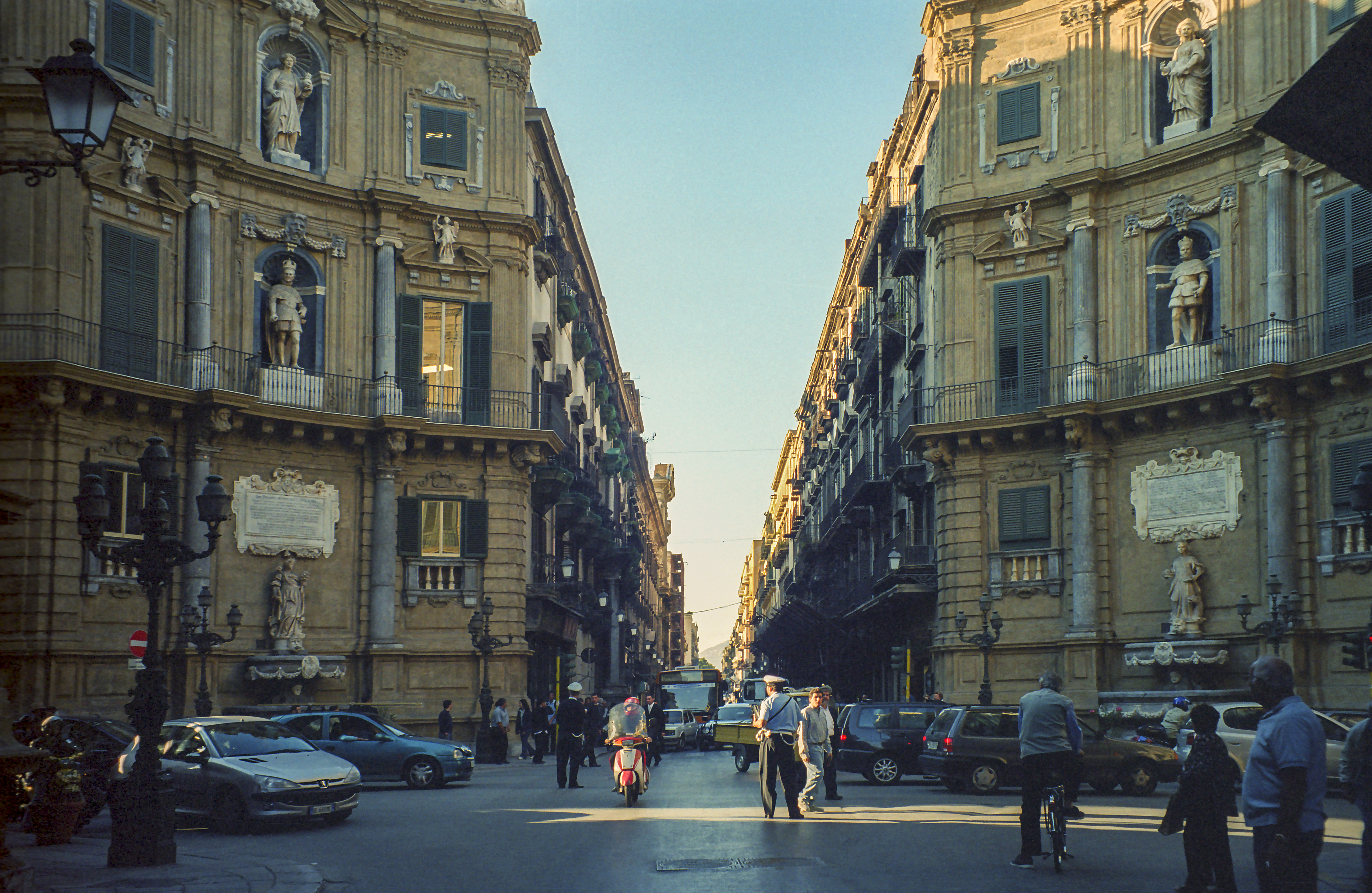 Sicily, Palermo, Quattro Canti